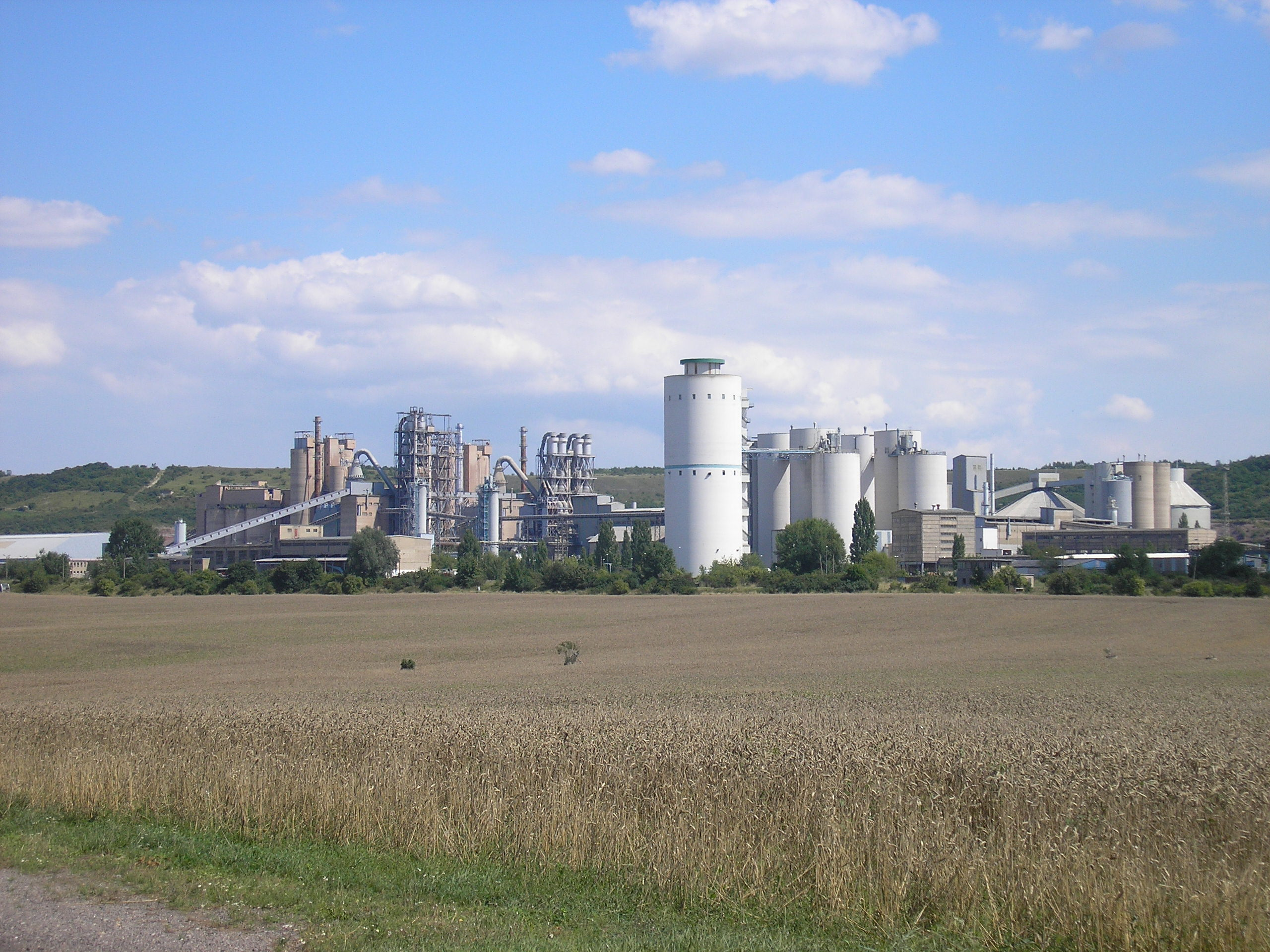 Das Zementwerk in Karsdorf (Sachsen-Anhalt).